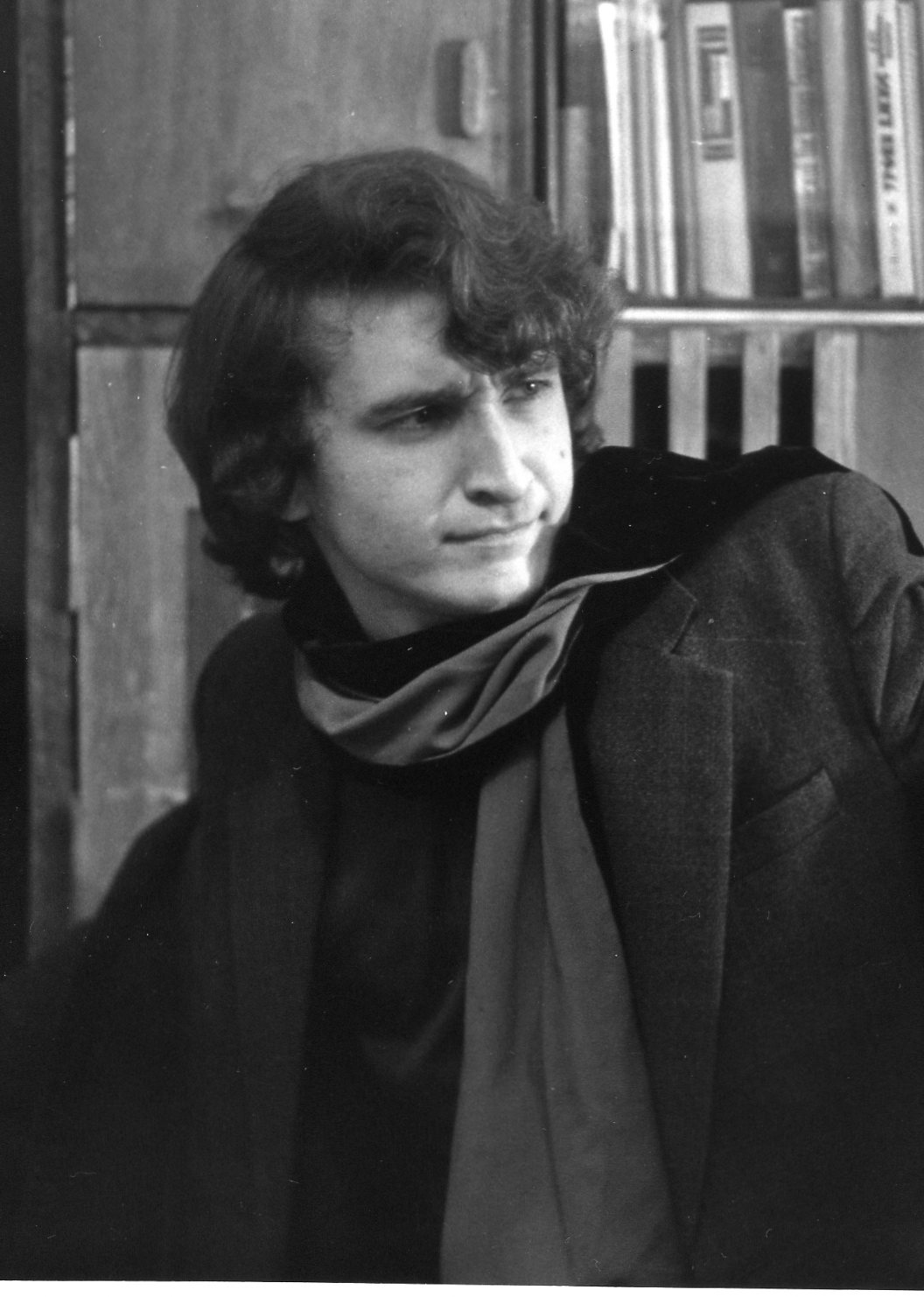 Режиссёр независимого кино Дмитрий Фролов